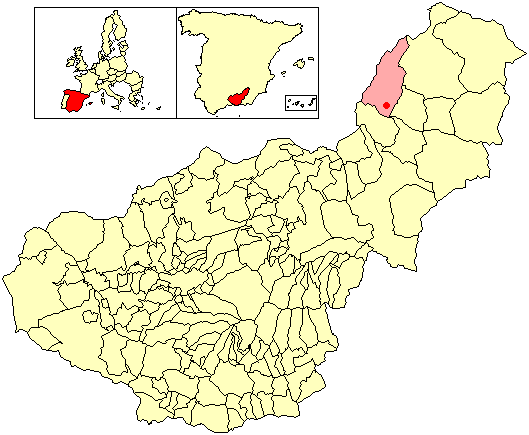 Situación de la localidad de Isidoros (en el municipio de Castril) respecto a la provincia de Granada, en España.